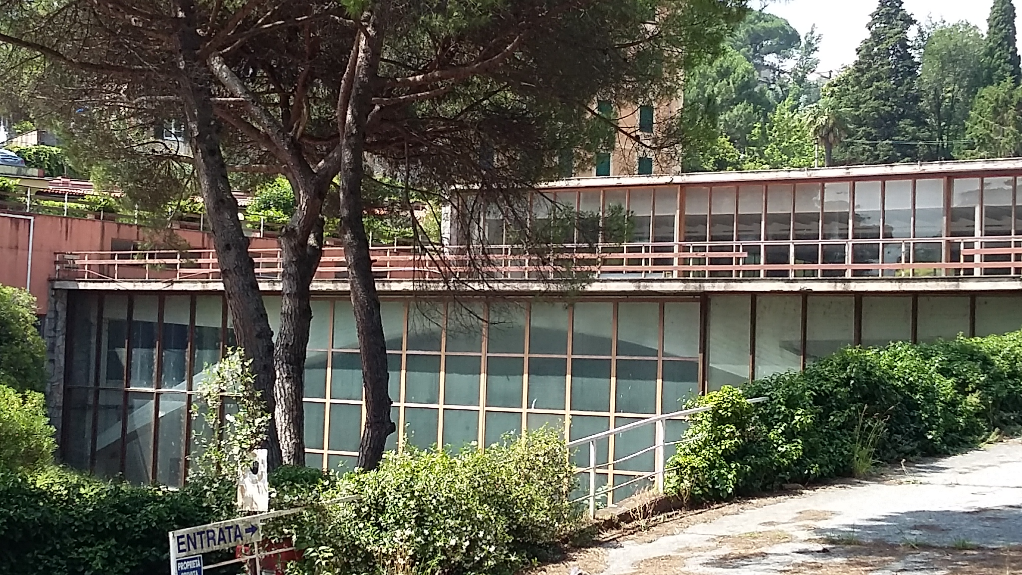 veduta dalla strada del garage per yacht di Daneri e delle strutture di Nervi